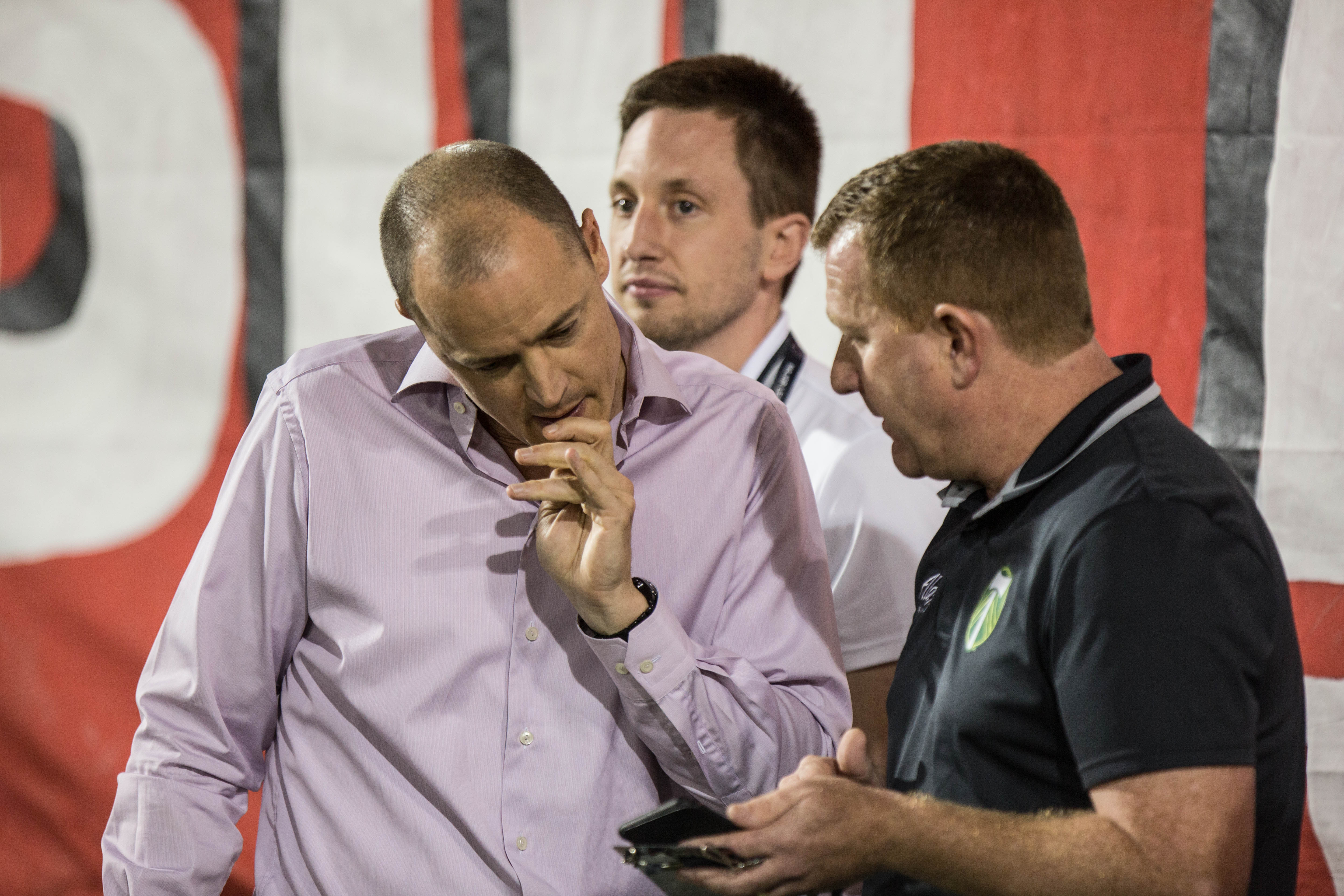 N42A3756.jpg